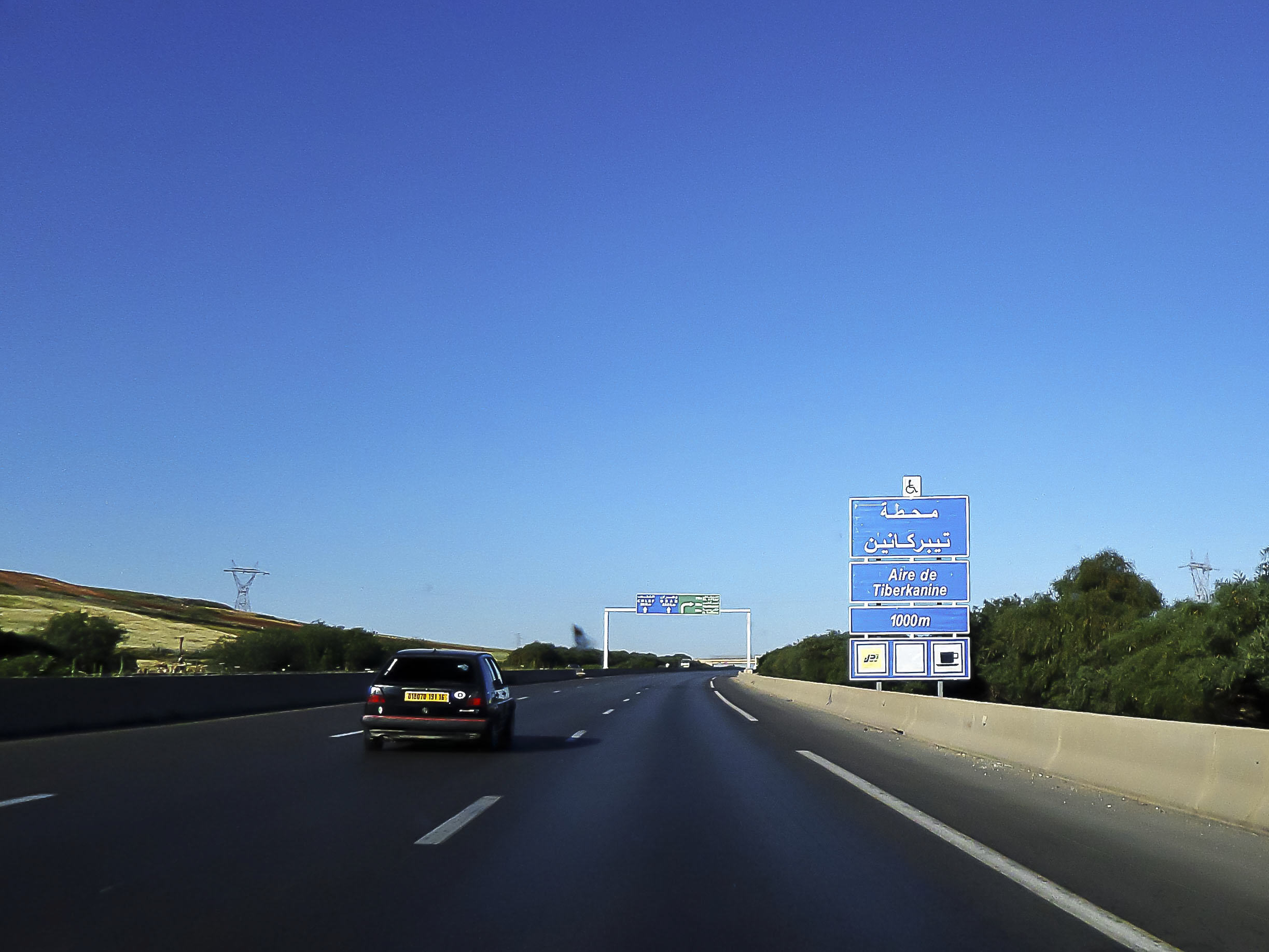 Tiberkanine تيبركانين